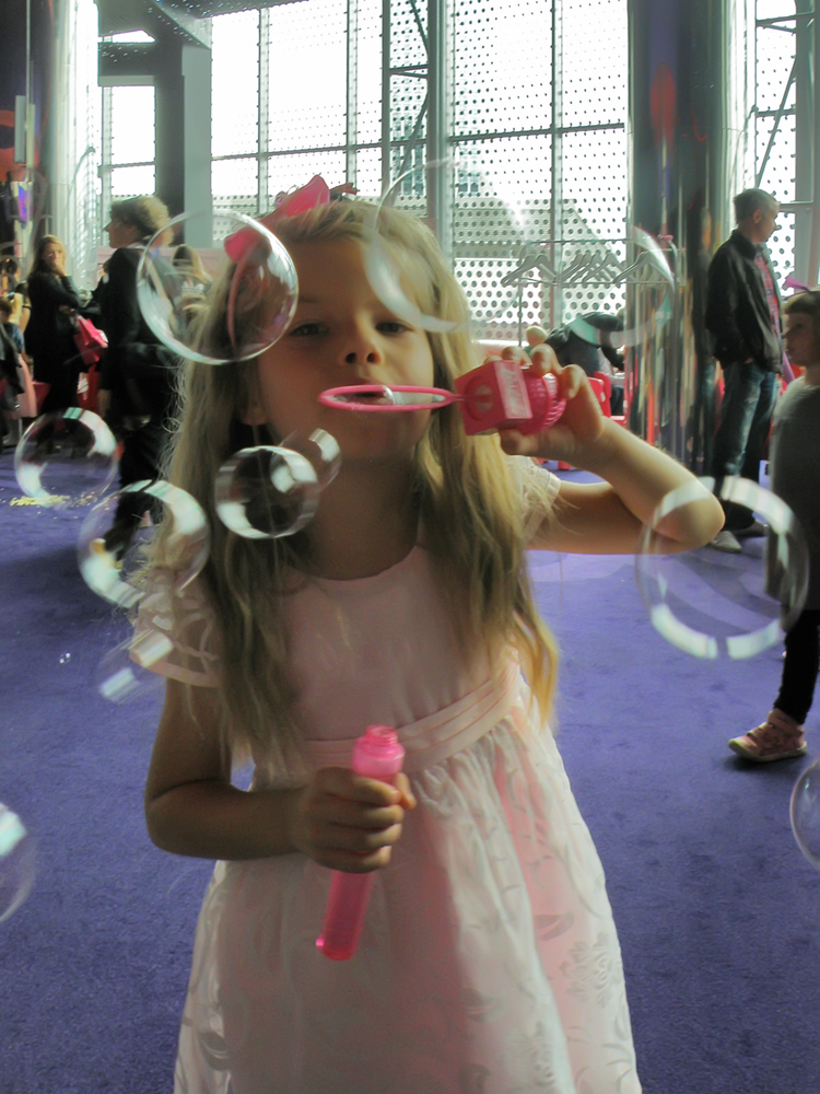 Multikino Złote Tarasy, Warszawa, premierowy pokaz filmu „Barbie Księżniczka i Piosenkarka”